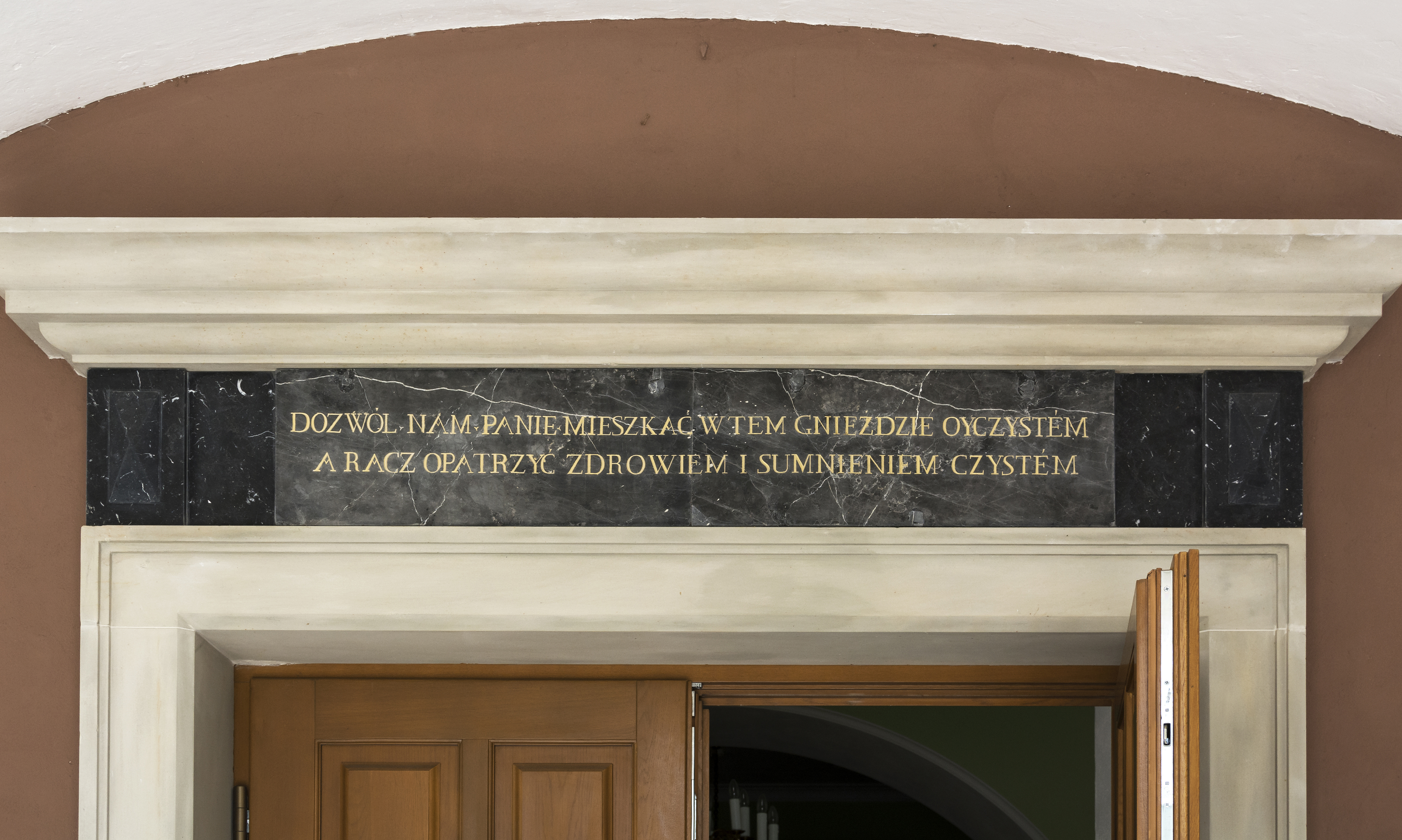 Tarnobrzeg, pałac, XV, XVIII, 1830, 1929